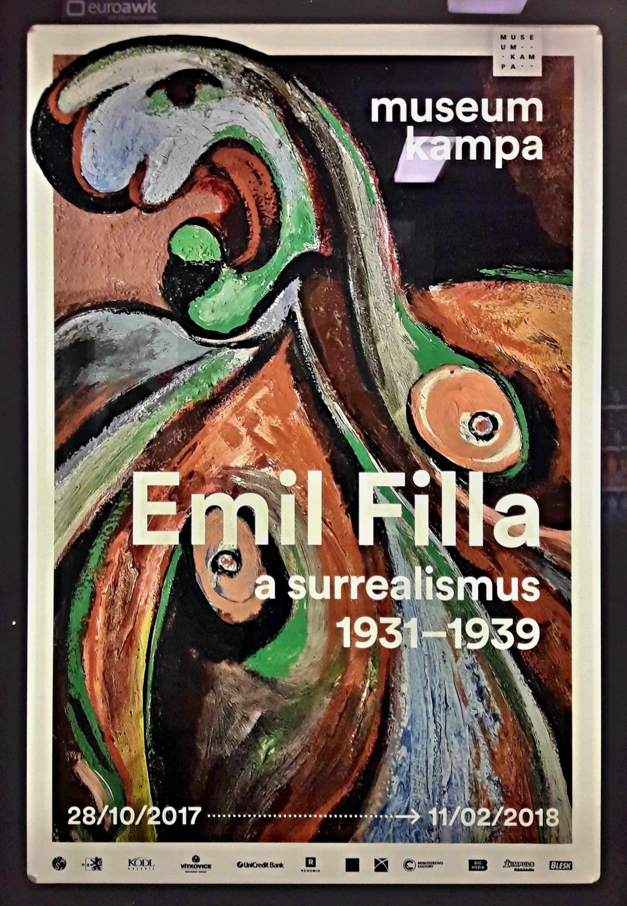 Muzeum Kampa E. Filla